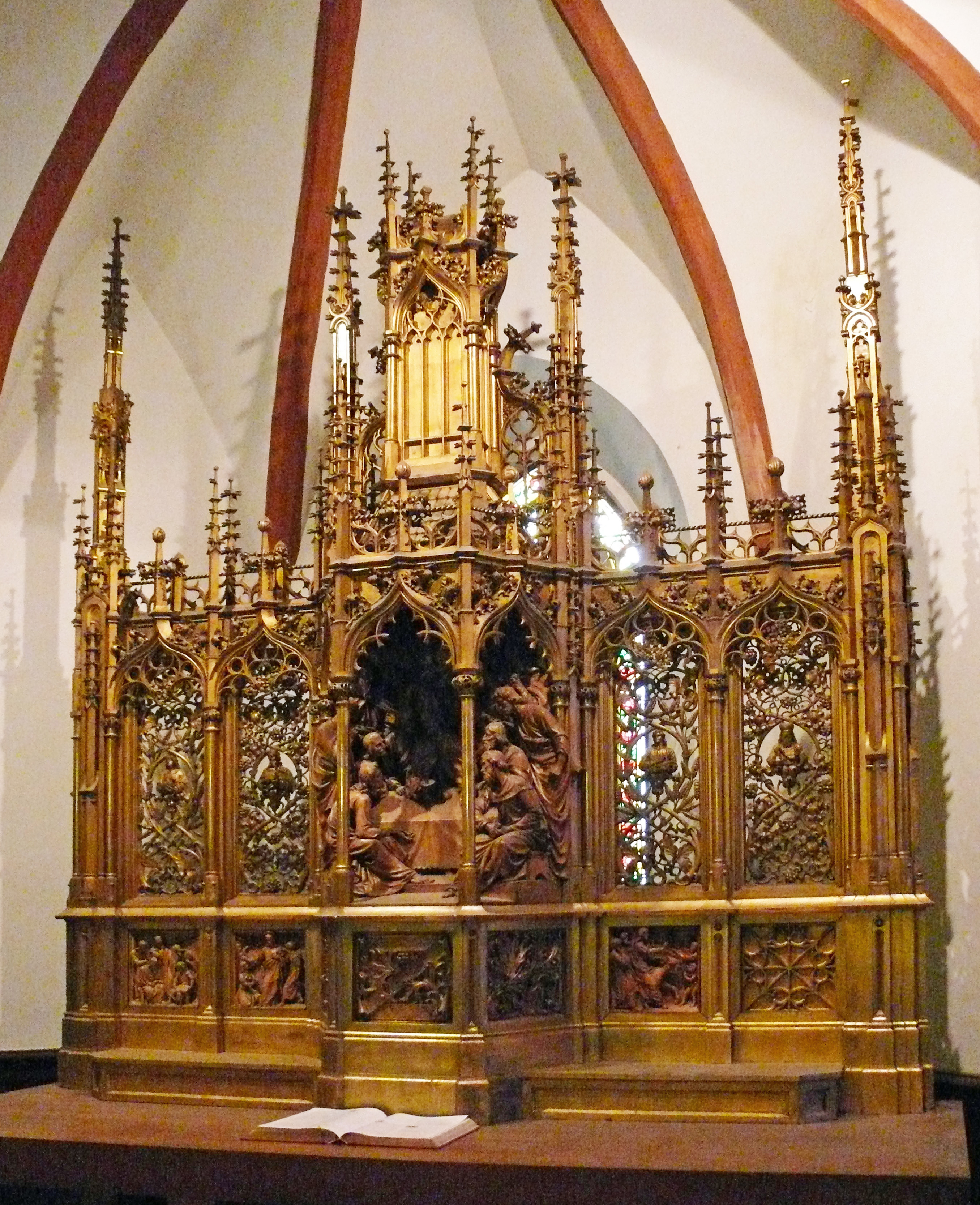 Retabel met houtsnijwerk, Het Laatste Avondmaal in de Thomaskirche, Leipzig, Duitsland.